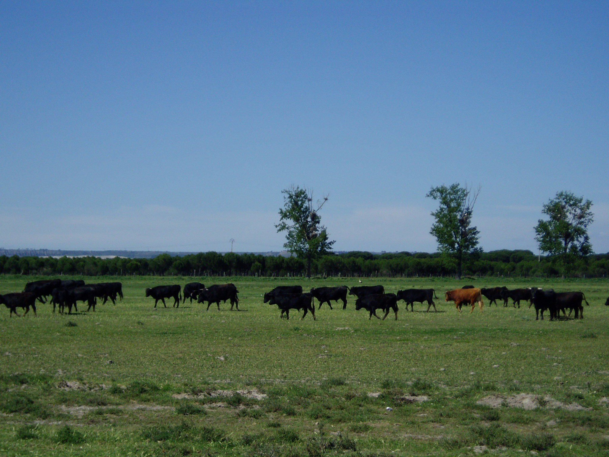 Salgüeros de Aldeamayor This is a photography of a Site of Community Importance in Spain with the ID: ES4180124. Natura2000 entry, EEA entry